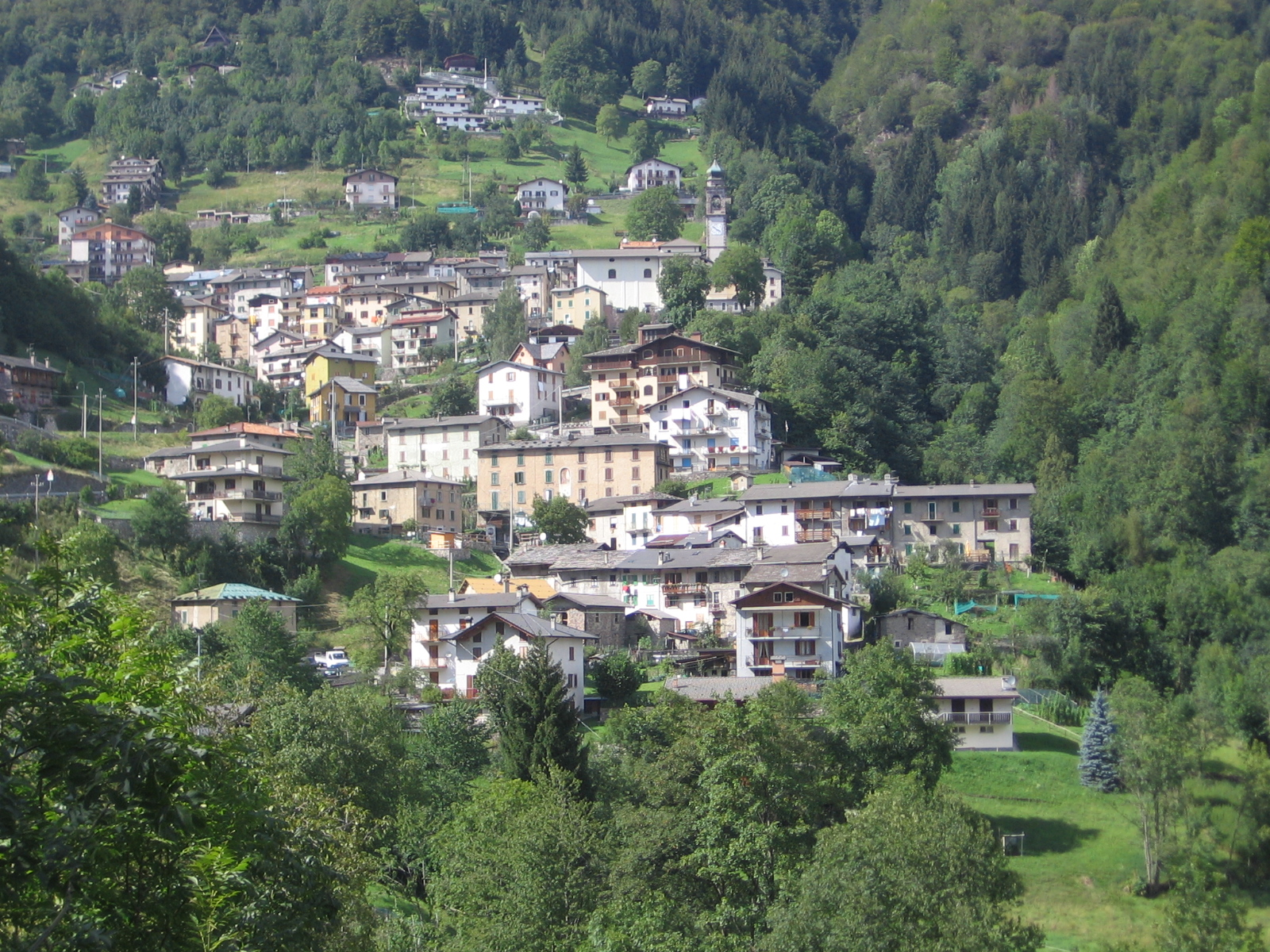 Cusio, Bergamo, Italy